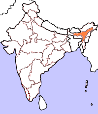 Kartan bygger på resultatet från valet till Lok Sabha april/maj 2004. Gult betyder att partiet lanserat en eller flera kandidater i delstaten, dock utan att vinna mandat. Orange betyder att partiet vunnit mandat från delstaten. Rött betyder att partiet vunnit minst 25% av mandaten från den delstaten och mörkrött 50% eller mer. Kartan tar inte hänsyn till avhopp, partifusioner och fyllnadsval under den ordinarie mandatperiodens gång.